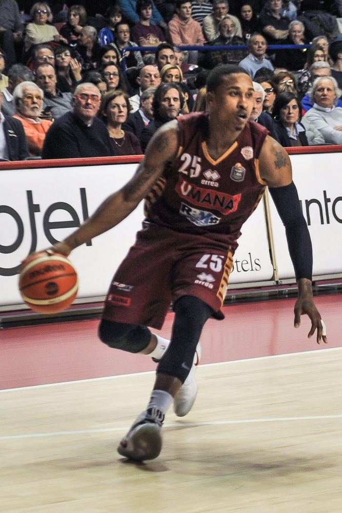 Tyrus McGee con la maglia della Reyer Venezia